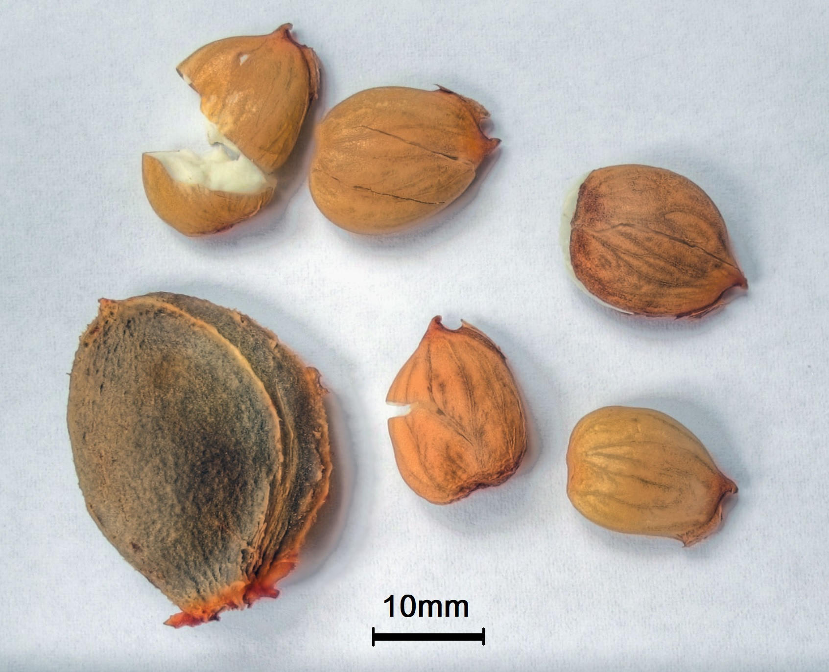 Aprikosensamen und Aprikosenkerne (Prunus armeniaca), geöffnet und ungeöffnet